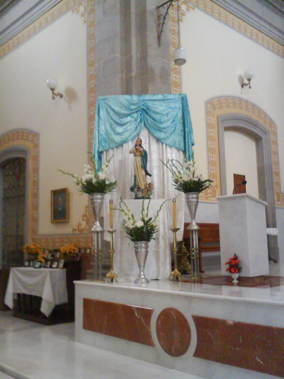 Monumento litúrgico en el presbiterio del templo parroquial para celebrar la "Asunción de María Santísima" hecho por la Orden Franciscana Seglar y las Hijas de María